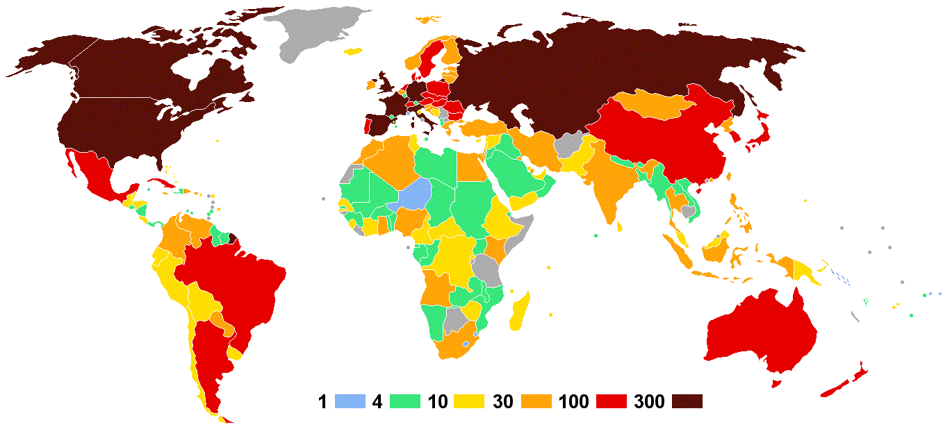 Olympische Sommerspiele 1992 — Anzahl der Athleten